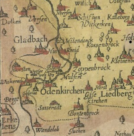 Vergrößerter Kartenausschnitt der Archiepiscopatus Coloniensis Pars Septentrionalis vom Gebiet des heutigen Mönchengladbach